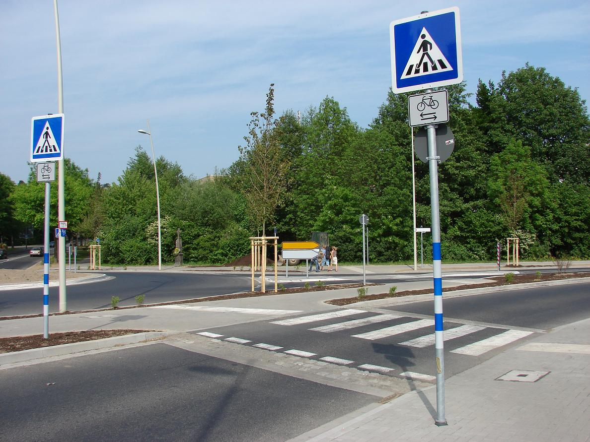 Fußgängerüberweg an einem Kreisverkehrs-Bypass mit Zeichen 350 und Zusatzzeichen 1000-32 für die Radfahrerfurt